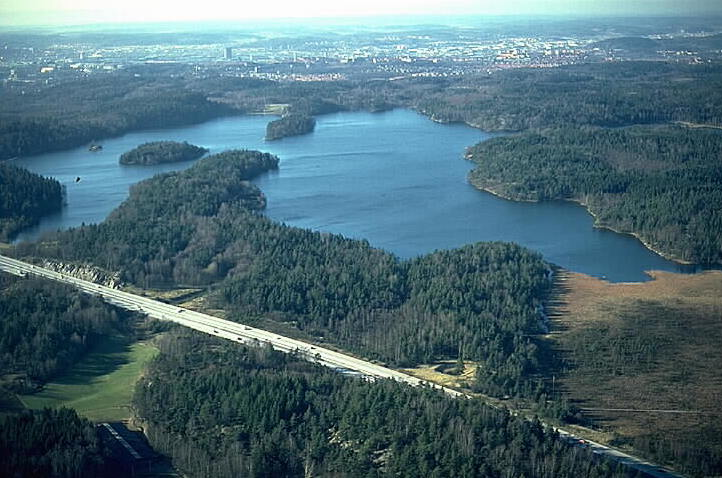 Miljö med stenåldersboplats. Motiv: Delsjön Nyckelord: Flygbilder, Riksintressen Kategori: Insjömiljöer Miljö med stenåldersboplats.